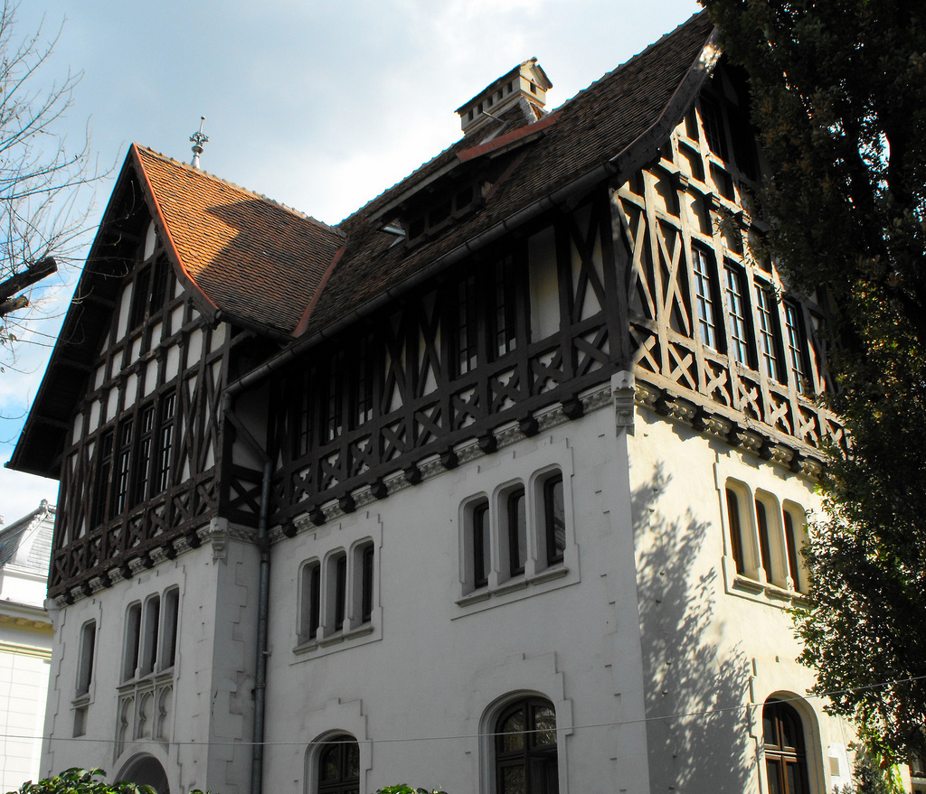 Dacia 52